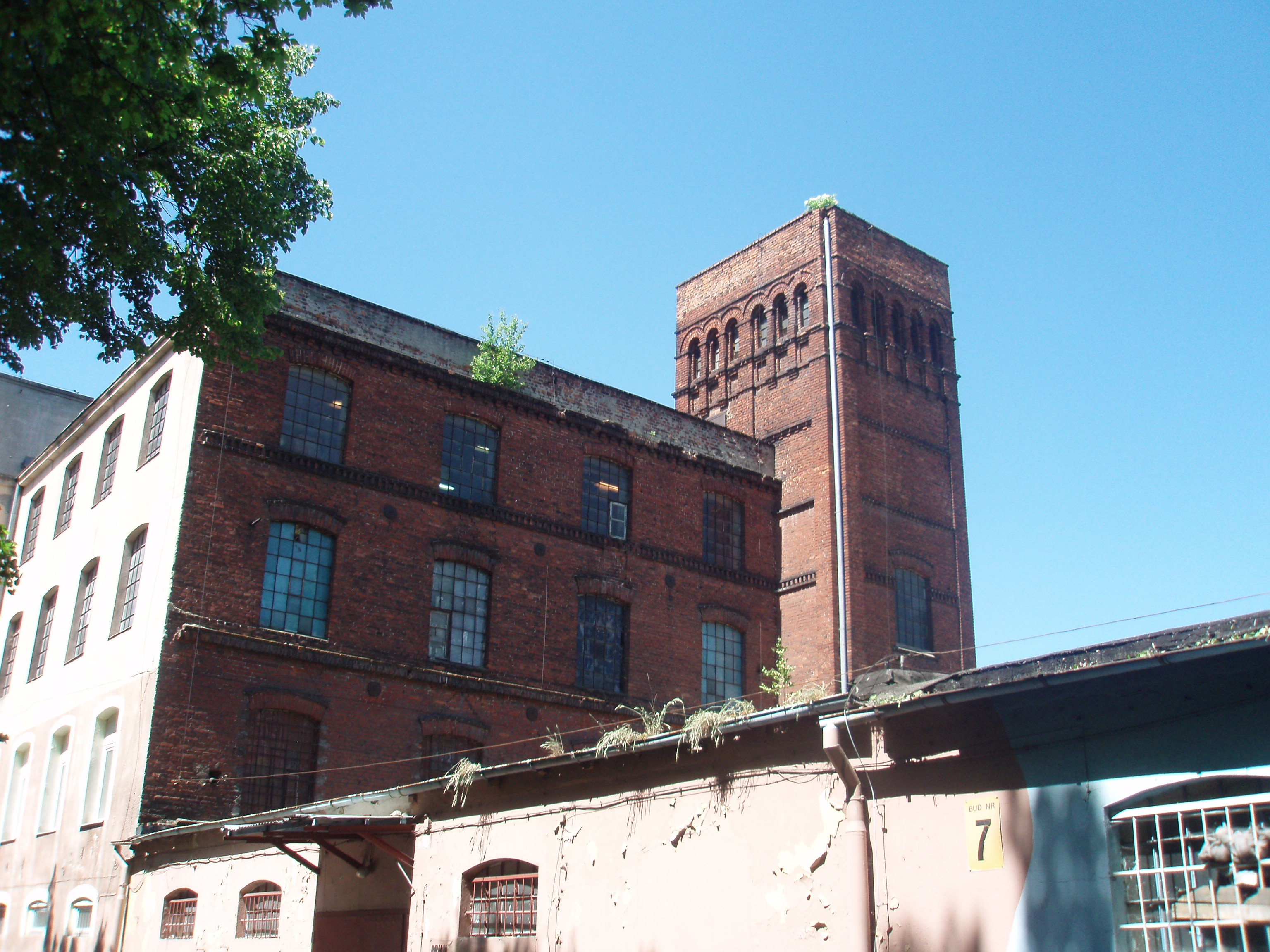 Obiekt w kompleksie przemysłowym przy ul. Rzgowskiej 26/28